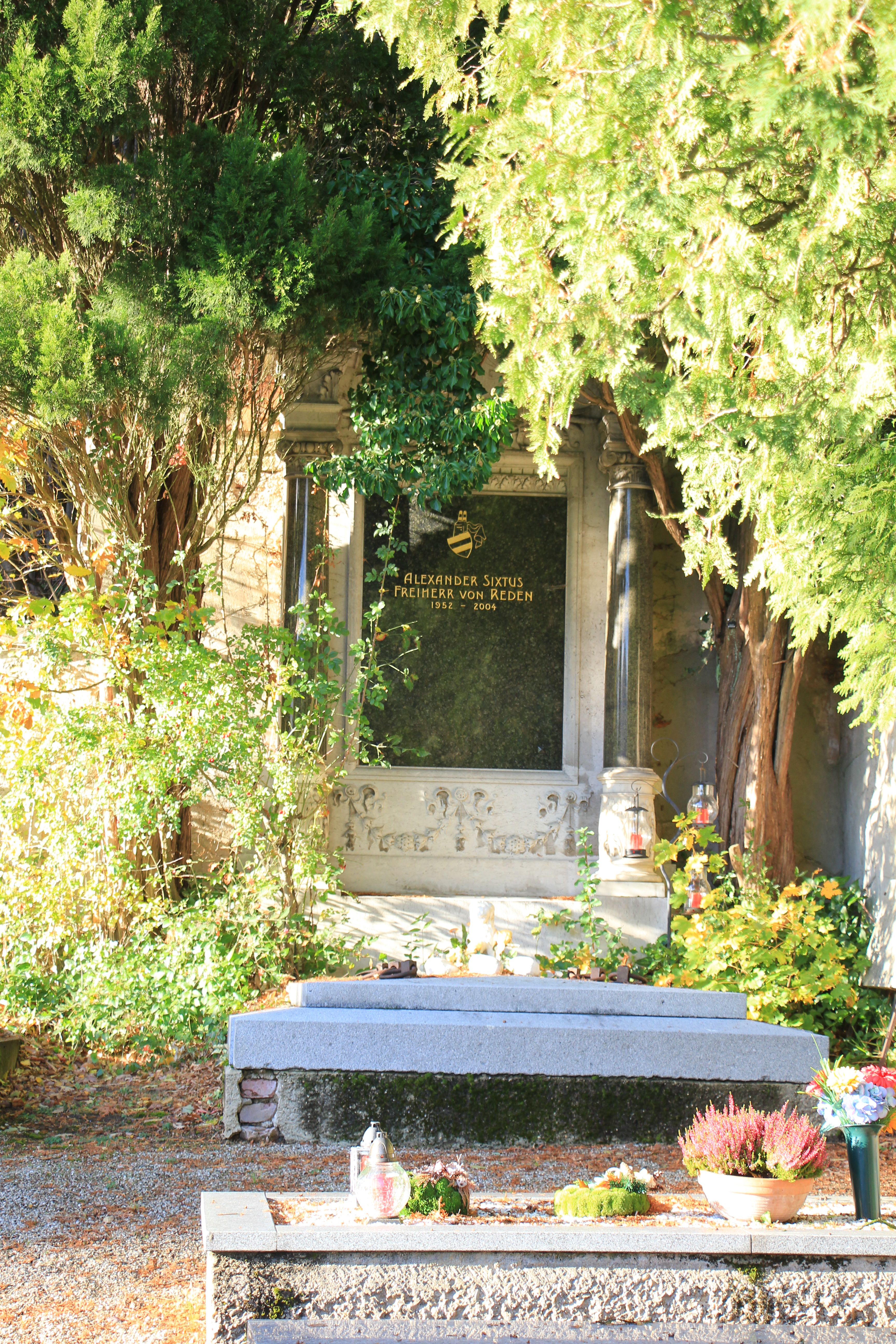 Waldfriedhof Kaltenleutgeben - Grab von Alexander Sixtus Freiherr von Reden